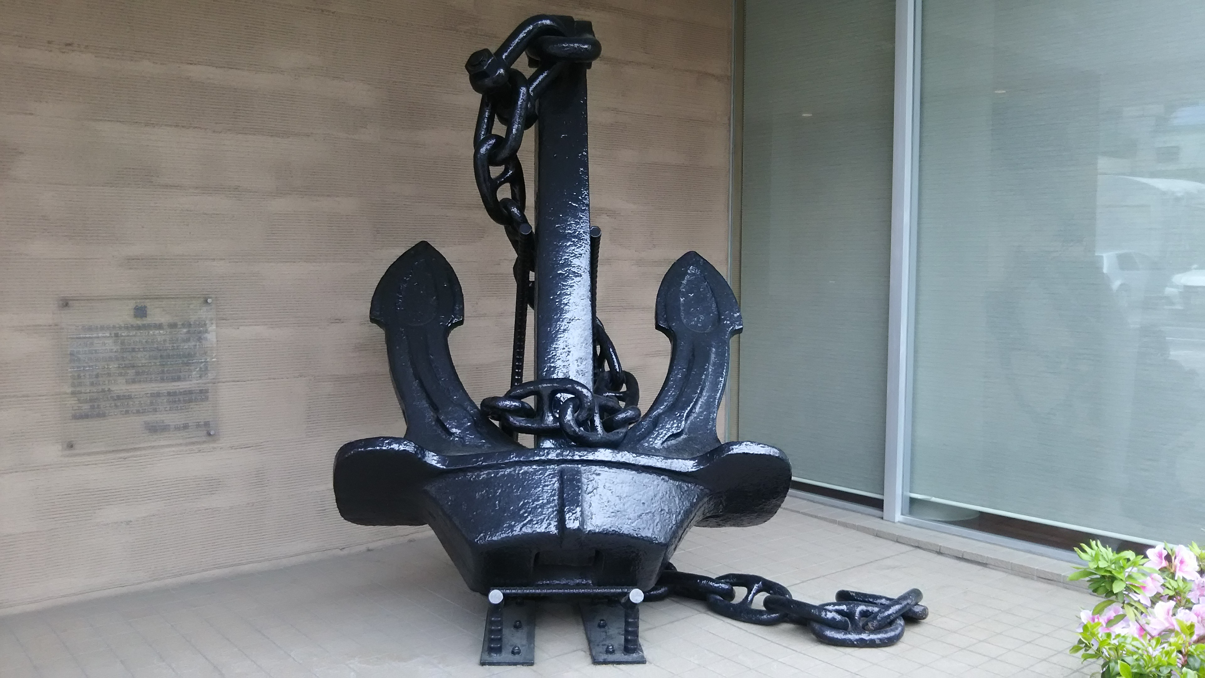 山田病院にて撮影